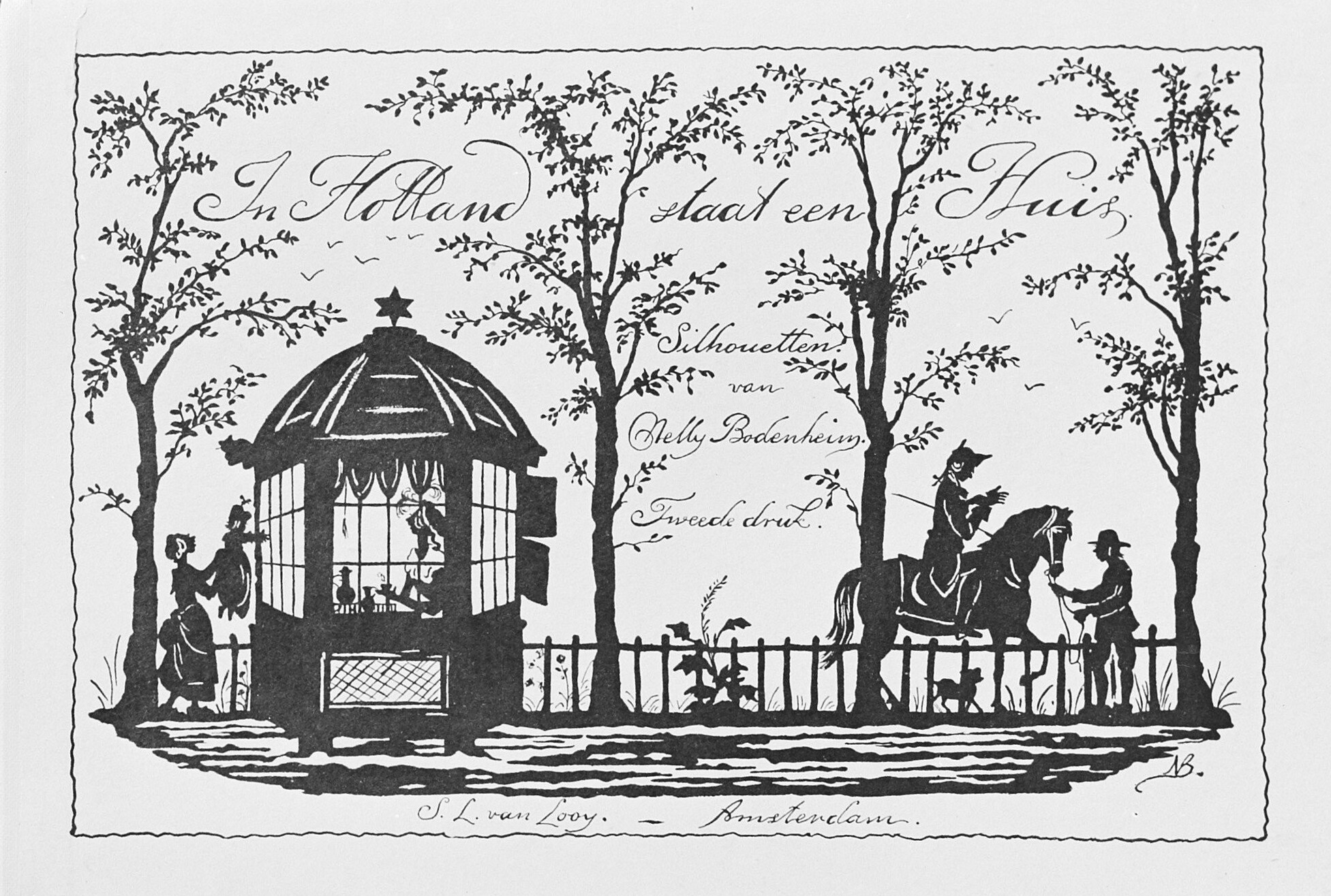 Collectie / Archief : Fotocollectie Anefo Reportage / Serie : [ onbekend ] Beschrijving : tentoonstellingen, Nelly Bodenheim Datum : 5 oktober 1949 Trefwoorden : tentoonstellingen Persoonsnaam : Nelly Bodenheim Instellingsnaam : Stedelijk Museum Fotograaf : Noske, J.D. / Anefo Auteursrechthebbende : Nationaal Archief Materiaalsoort : Glasnegatief Nummer archiefinventaris : bekijk toegang 2.24.01.09 Bestanddeelnummer : 903-6389 Reacties Geplaatst door Maaike op 23 maart 2013 - 14:43. één van de zeven Amsterdamse Joffers